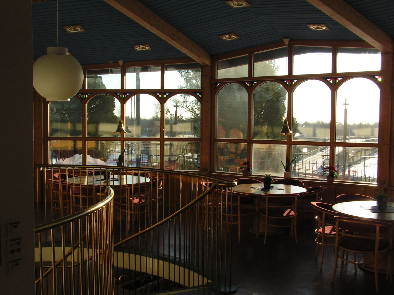 Umeå stads kyrka (utbyggnad)